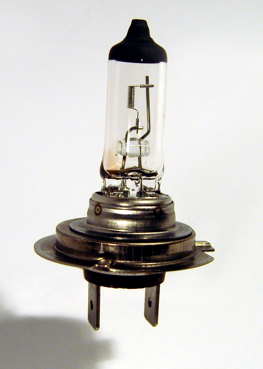 Philips 12 Volt / 55 Watt (H7)